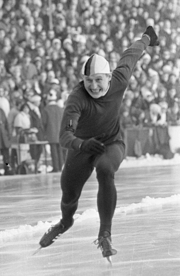 Wereldkampioenschappen schaatsen in Oslo, Traub (Duitsland) in aktie op de 500 meter